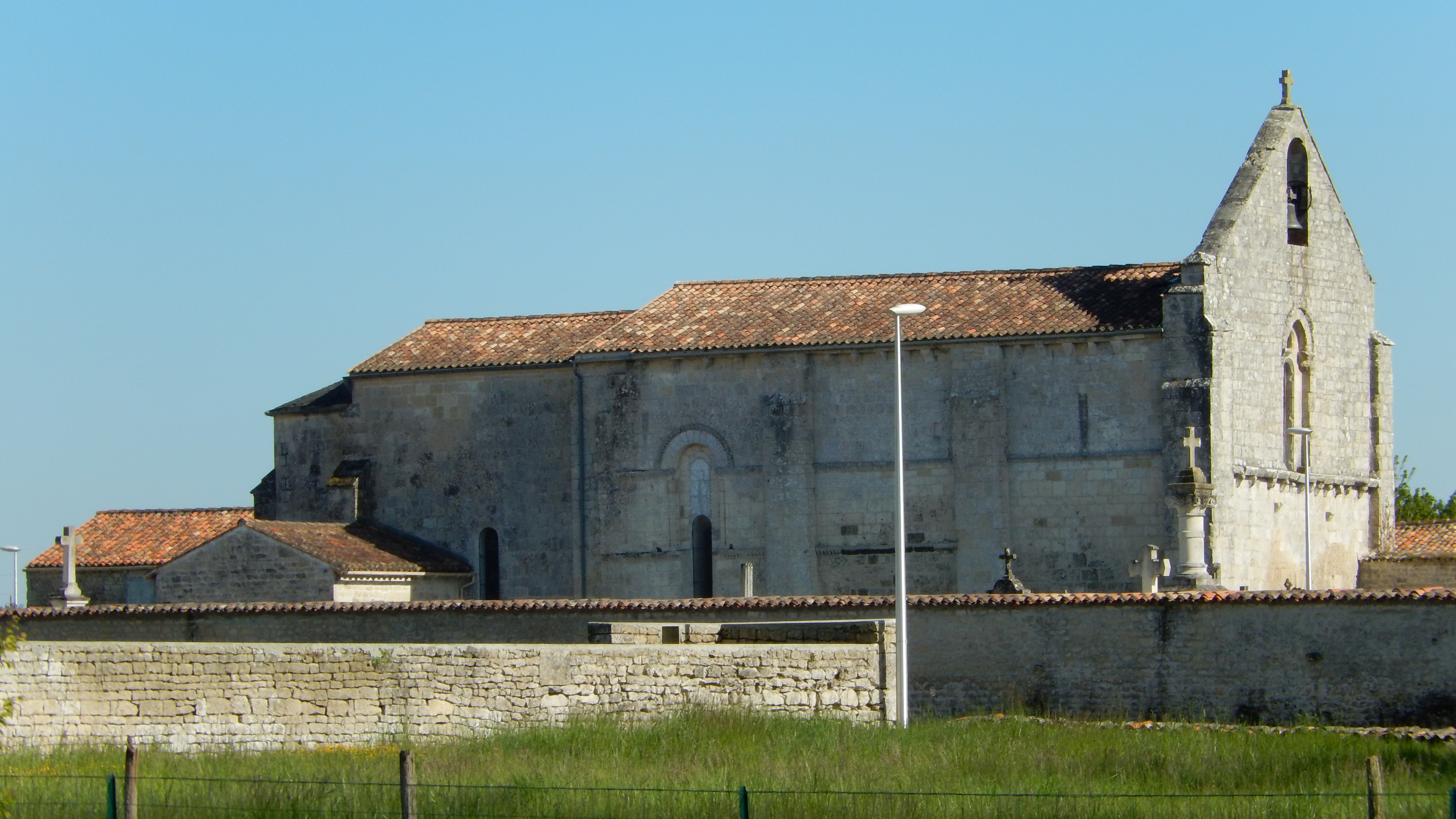 L'église Saint Vivien de Coivert (Charente-Maritime, France). Elle date du douzième siècle et a été partiellement reconstruite en 1898. La photo a été prise d'un peu plus loin, du lavoir pour être précis.